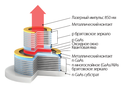 Схема строения вертикально-излучающего лазера с использованием нано- и пикотехнологий.